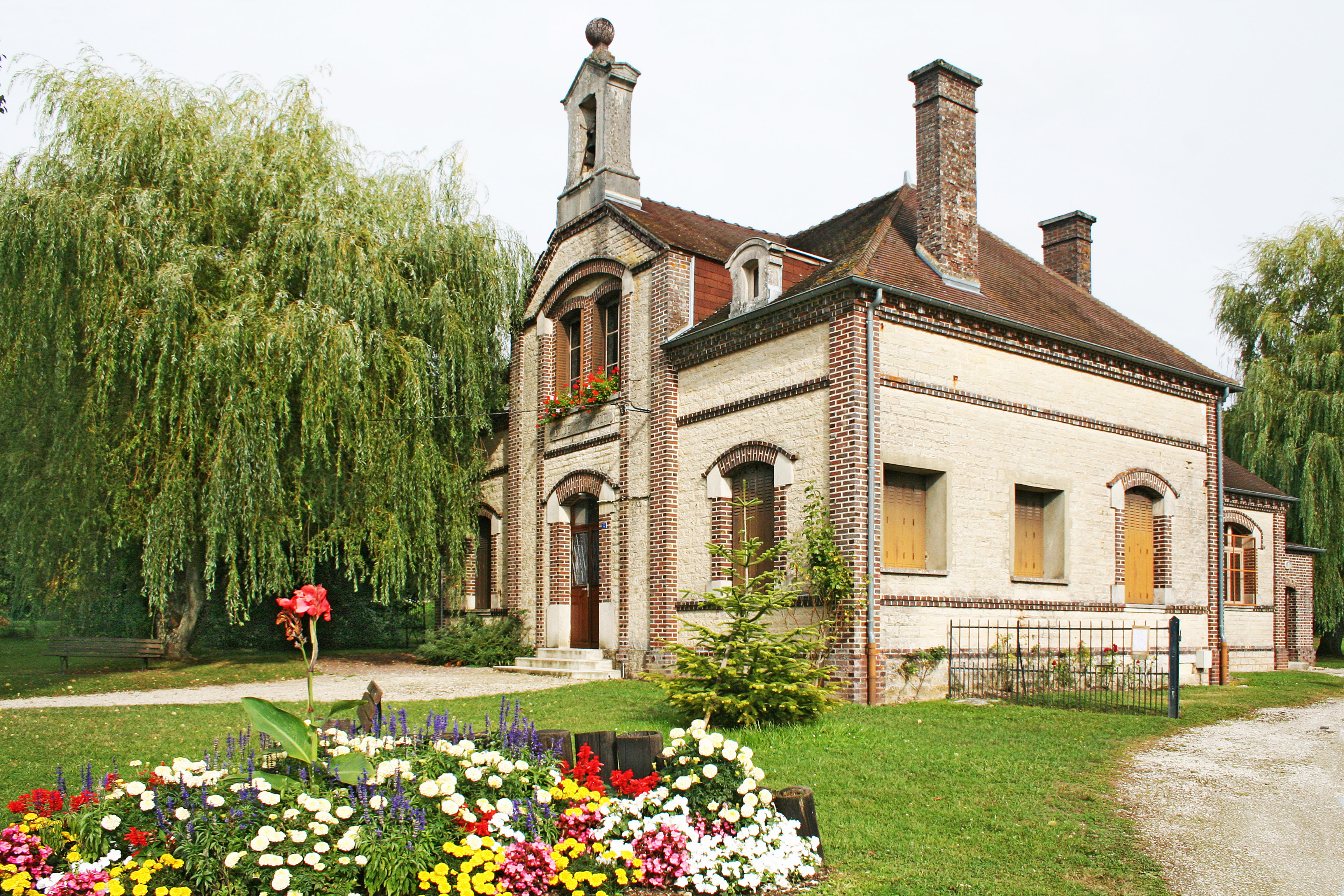 Ancienne école de la Vendue-Mignot